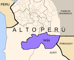 mapa de tarija trabajo propio basado en mapa de bolivia de wikicommons pruxo